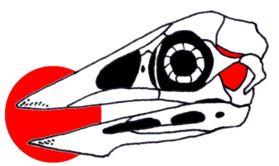 Schädelrekonstruktion des fossilen Vogels Confuciusornis sanctus verändert nach Chiappe et al. 1999. Rotorange: Der zahnlose Schnabel und die zwei Hinterhauptsöffnungen sind charakteristisch für diesen Vogel aus der chinesischen Unterkreide. Typ: nachbearbeitete Fineliner-Zeichnung.